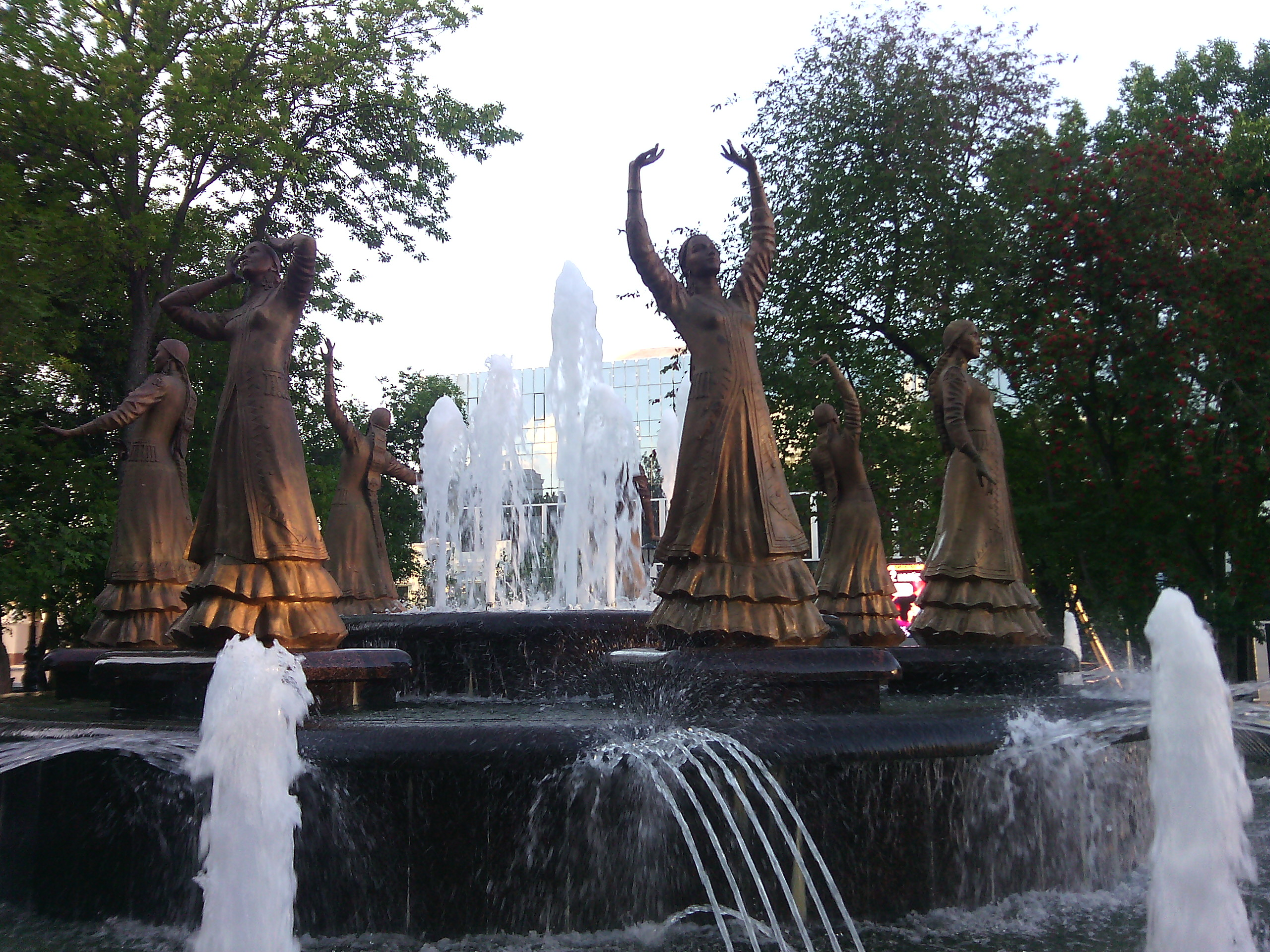 Фонтан "Семь девушек"